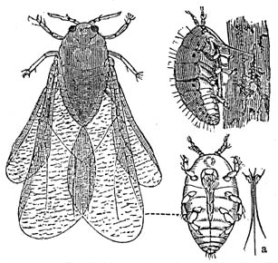 Skizze der Reblaus (Dactylosphaera vitifolii); die einzelnen Bilder stellen dar: Reblaus ungeflügelt, Reblaus geflügelt, Reblaus saugend. a Saugrüssel der Reblaus. Stark vergrößert. im Original noch mit der (heute falschen?) Bezeichnung: Phylloxera vastatrix. / drawing of the Phylloxera (Dactylosphaera vitifolii)